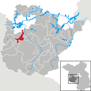 Wollin in Brandenburg (Country) - District Potsdam-Mittelmark